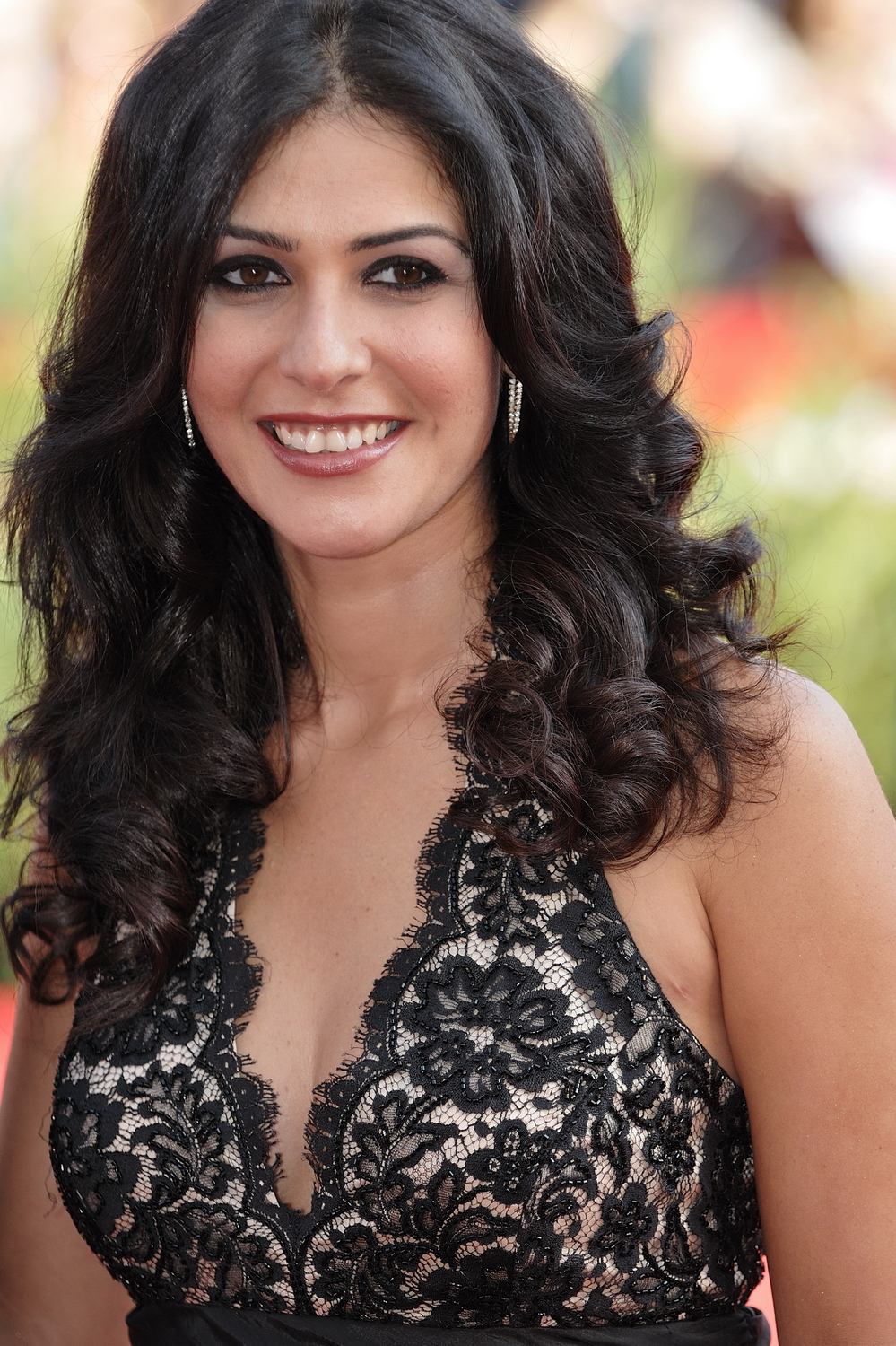 66ème Festival du Cinéma de Venise (Mostra), 9ème jour (10/09/2009) Tapis rouge avec Omar Sharif et Cyrine AbdelNour pour le film The Traveller de Ahmed Maher